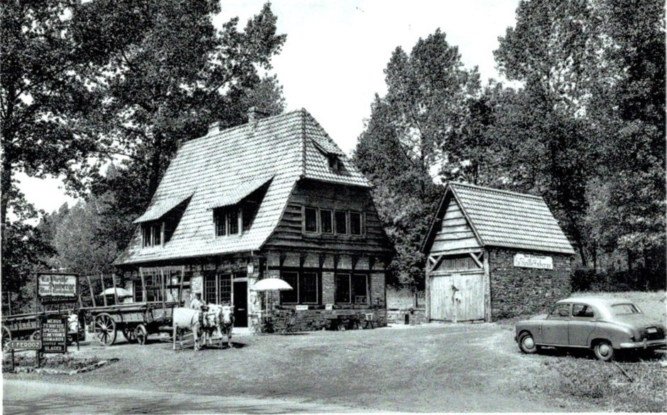 Au bord de la nationale 4, à Beuzet, en province de Namur, la vieiile auberge.